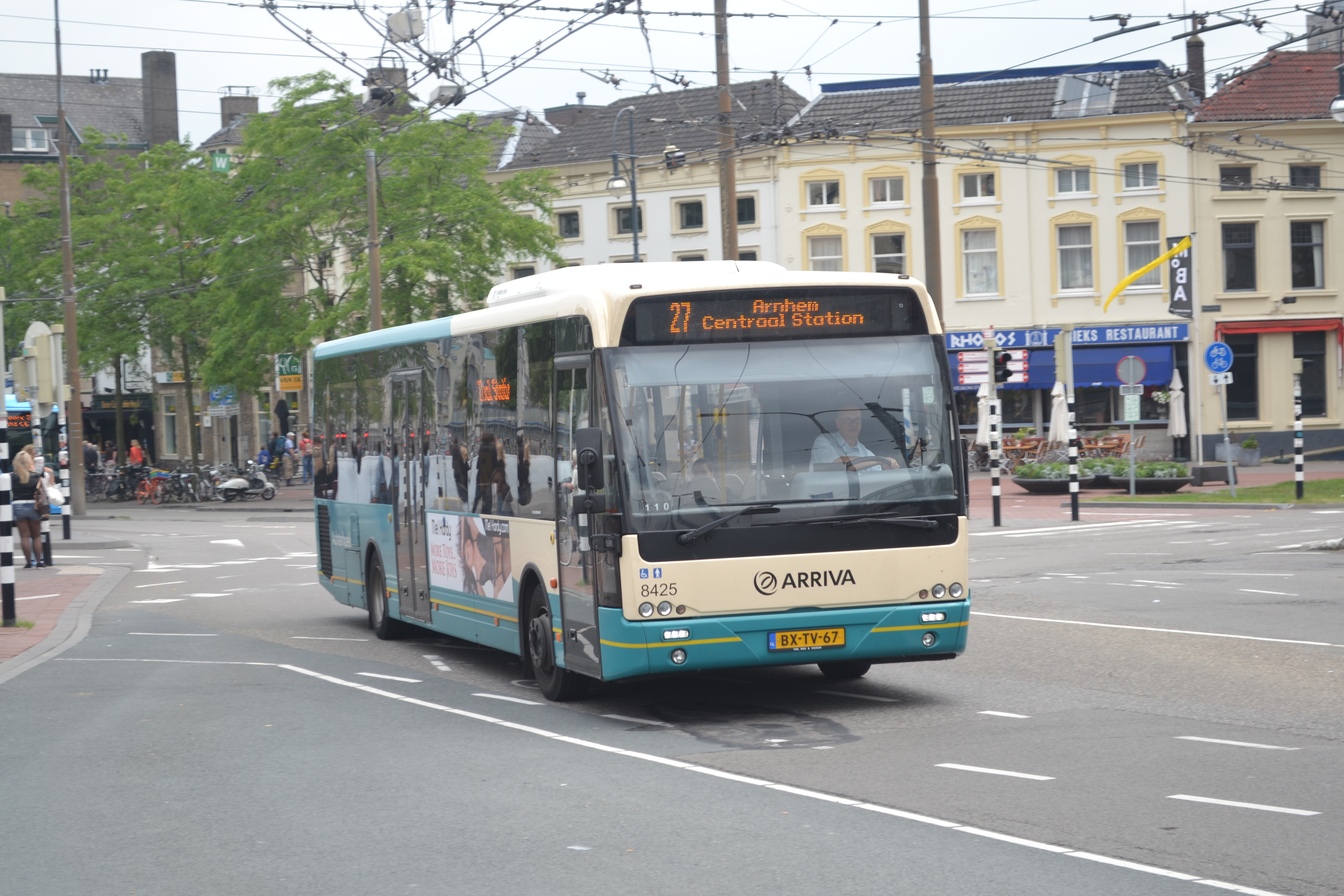 Arriva Ambassador 8425 als lijn 27 bij zijn eindpunt, station Arnhem